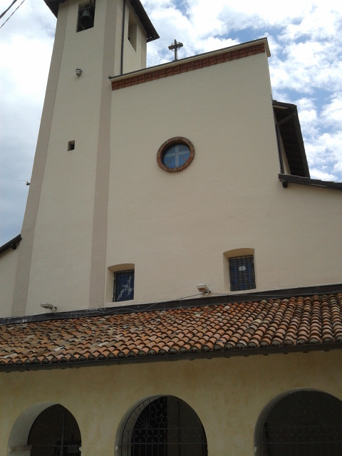 Chiesa di San Pietro Apostolo